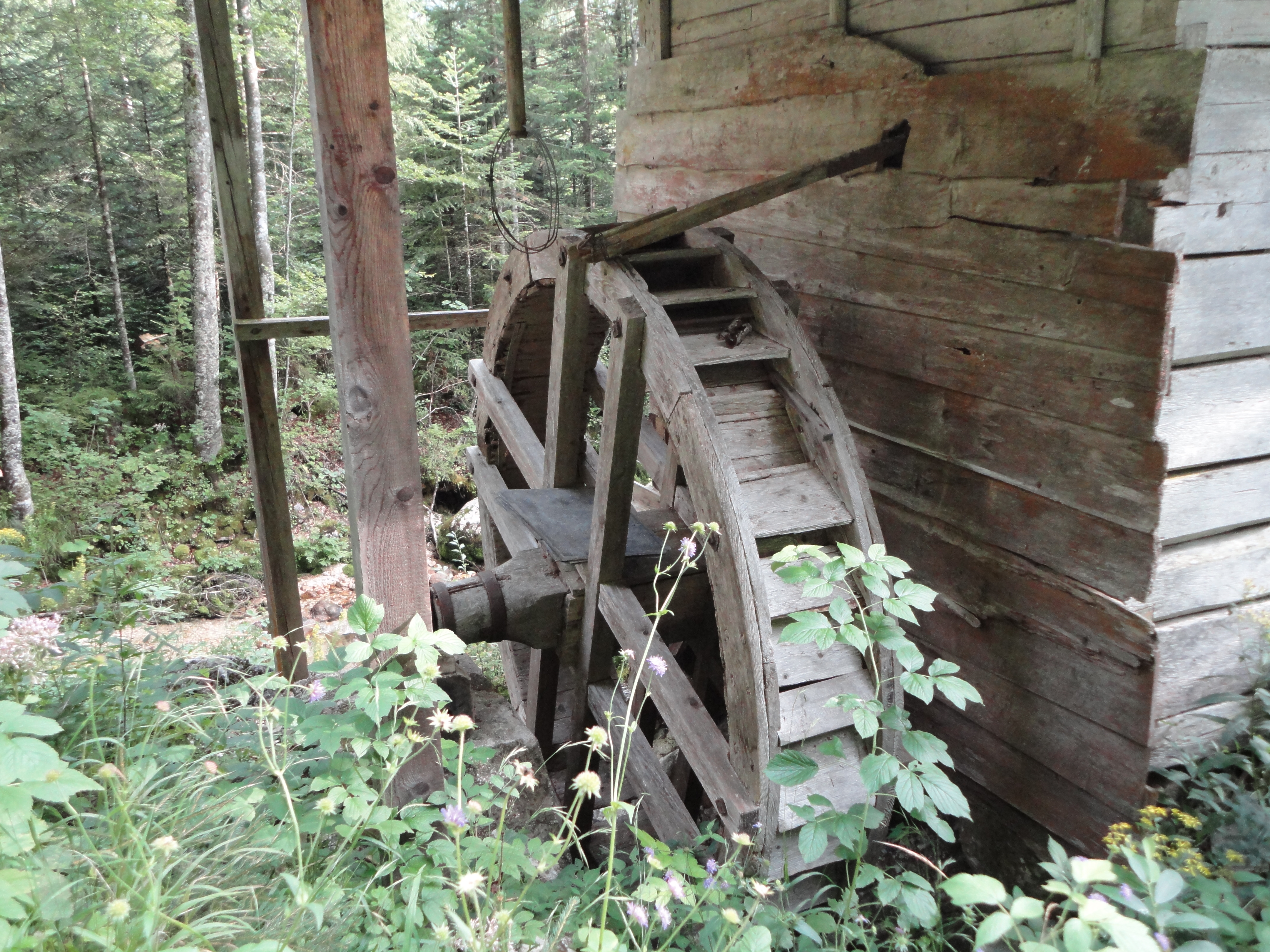 Schachnermühle in Grundlsee